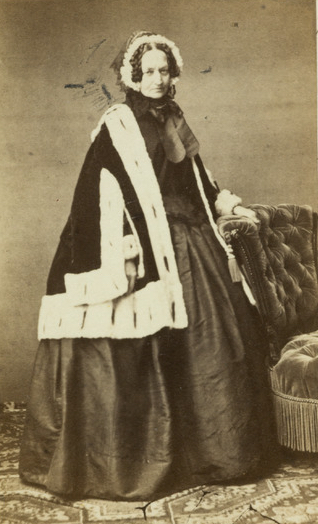 Foto van Henriëtte d'Oultremont de Wégimont (foto ca. 1862); auteursrecht begrijpelijkerwijs verlopen. Afbeelding komt in meerdere publicaties voor.